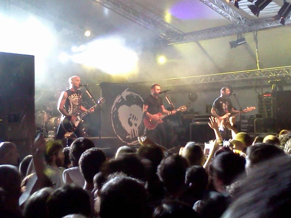 I Rise Against dal vivo al Circolo Magnolia, Segrate nel 2012